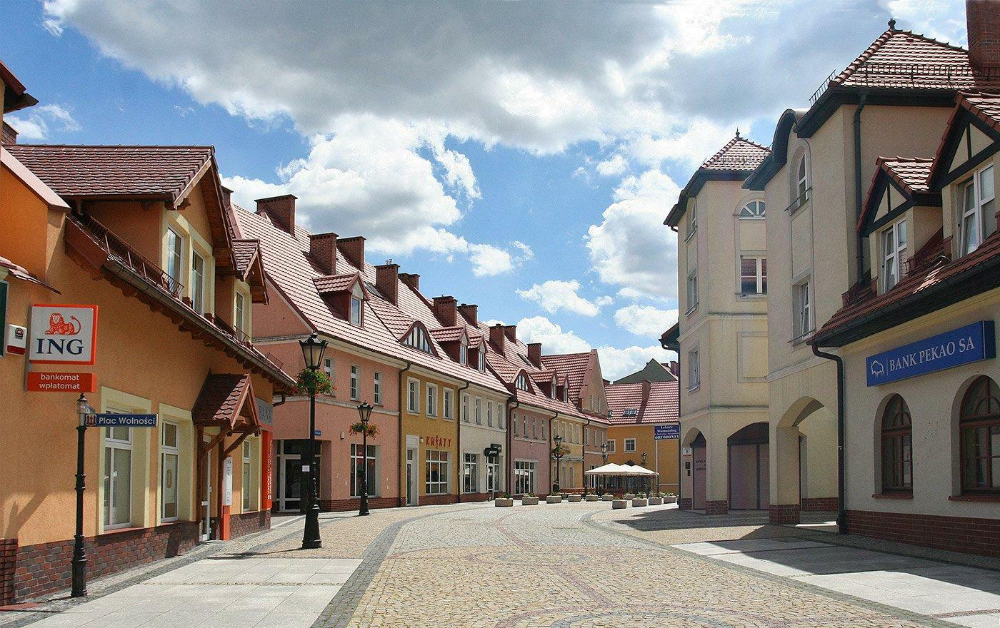 Przykład martwej przestrzeni publicznej lipcowej niedzieli 2007 r. (w samo południe!) Nowa zabudowa "starego miasta", bo tu chyba kamień na kamieniu. A jeśli częściowo przedwojenna to starannie wyremontowana. W parterach siedziby banków itp. wyludniły te ulice.